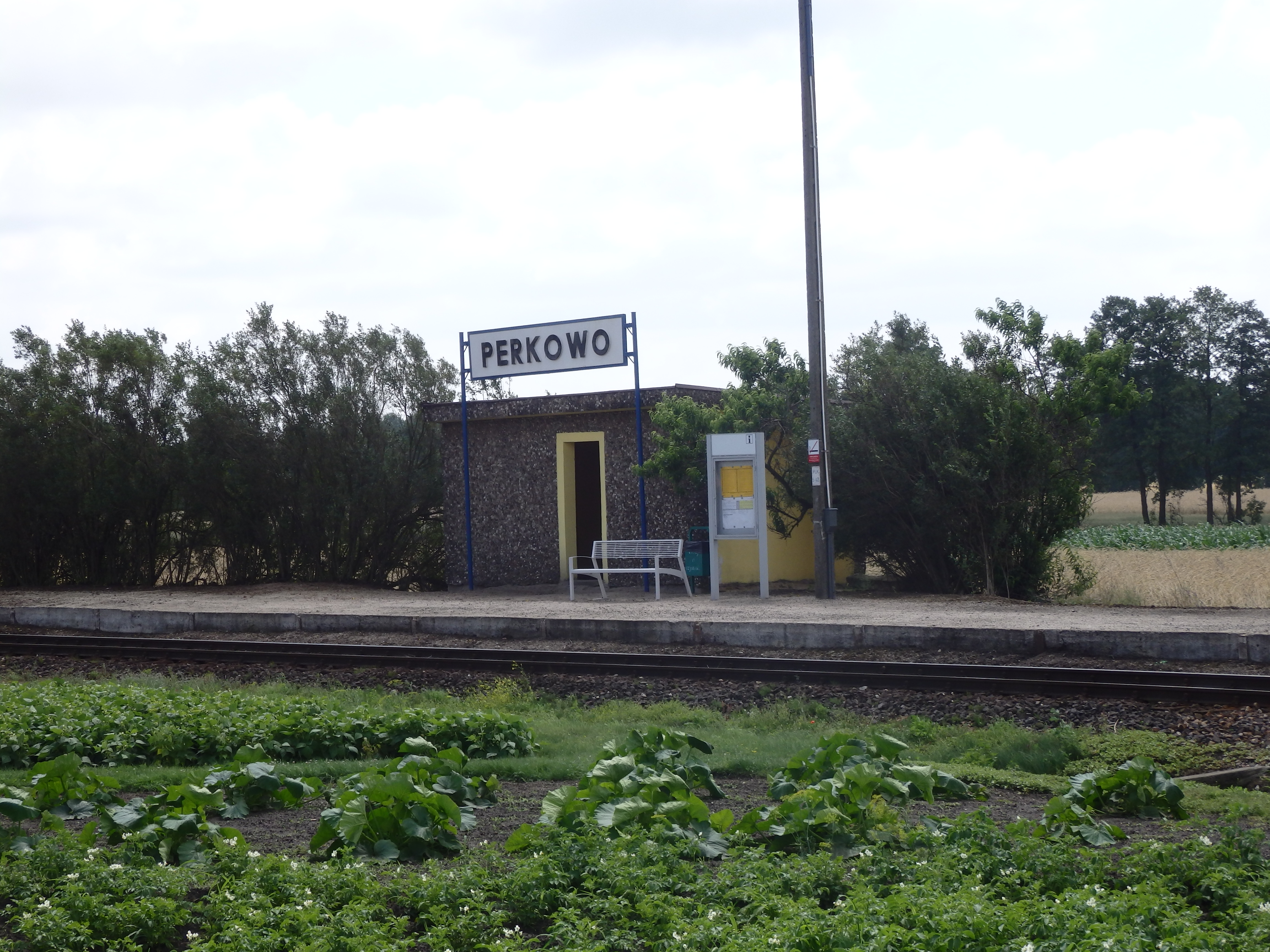 przystanek kolejowy w Perkowie.